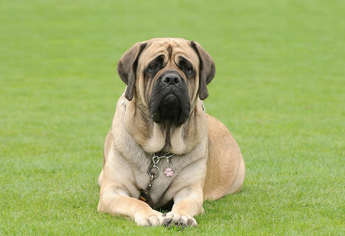 Perro de cruza